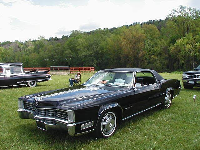 1968 Cadillac Eldorado1968 Eldorado